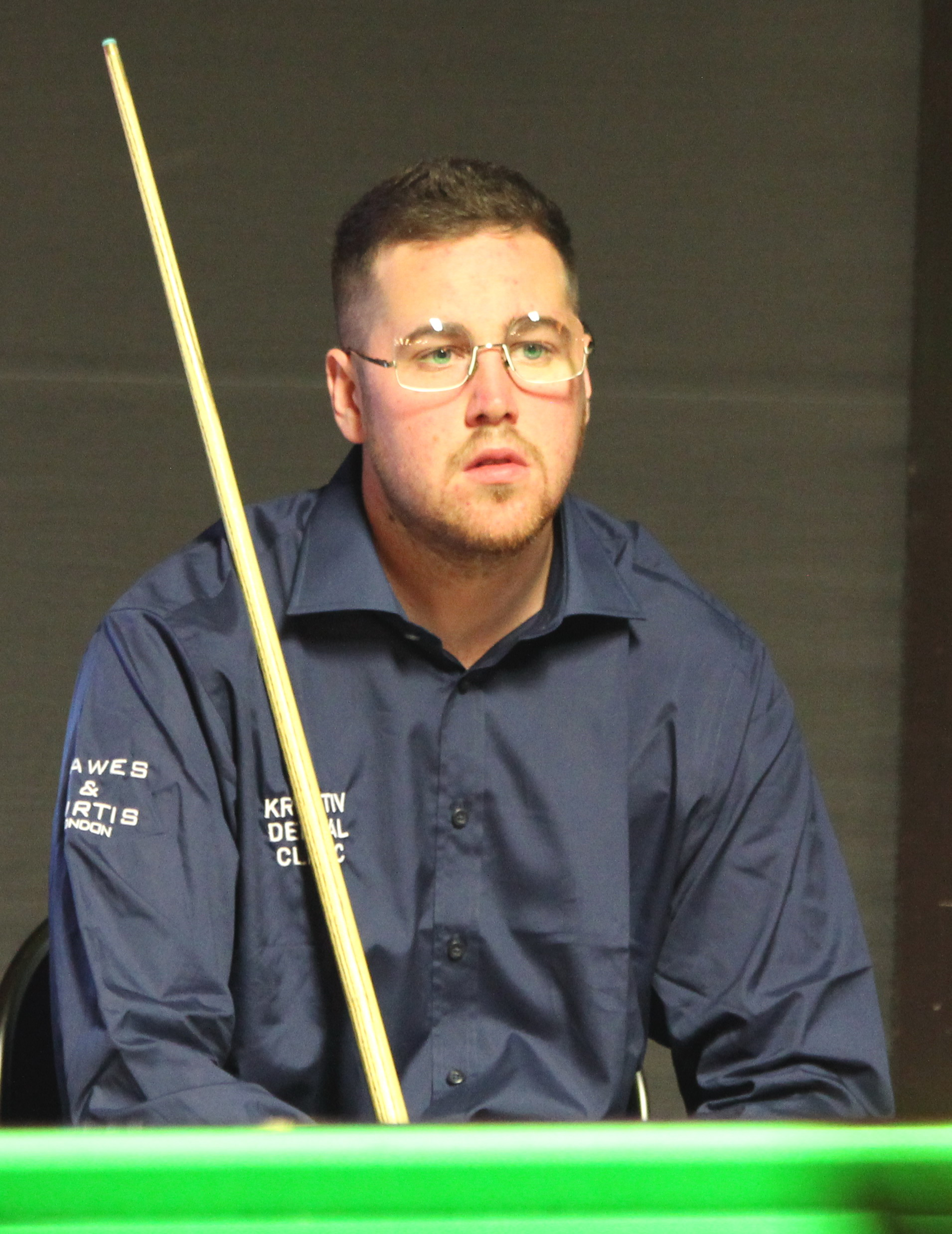 Gareth Allen beim Paul Hunter Classic 2015